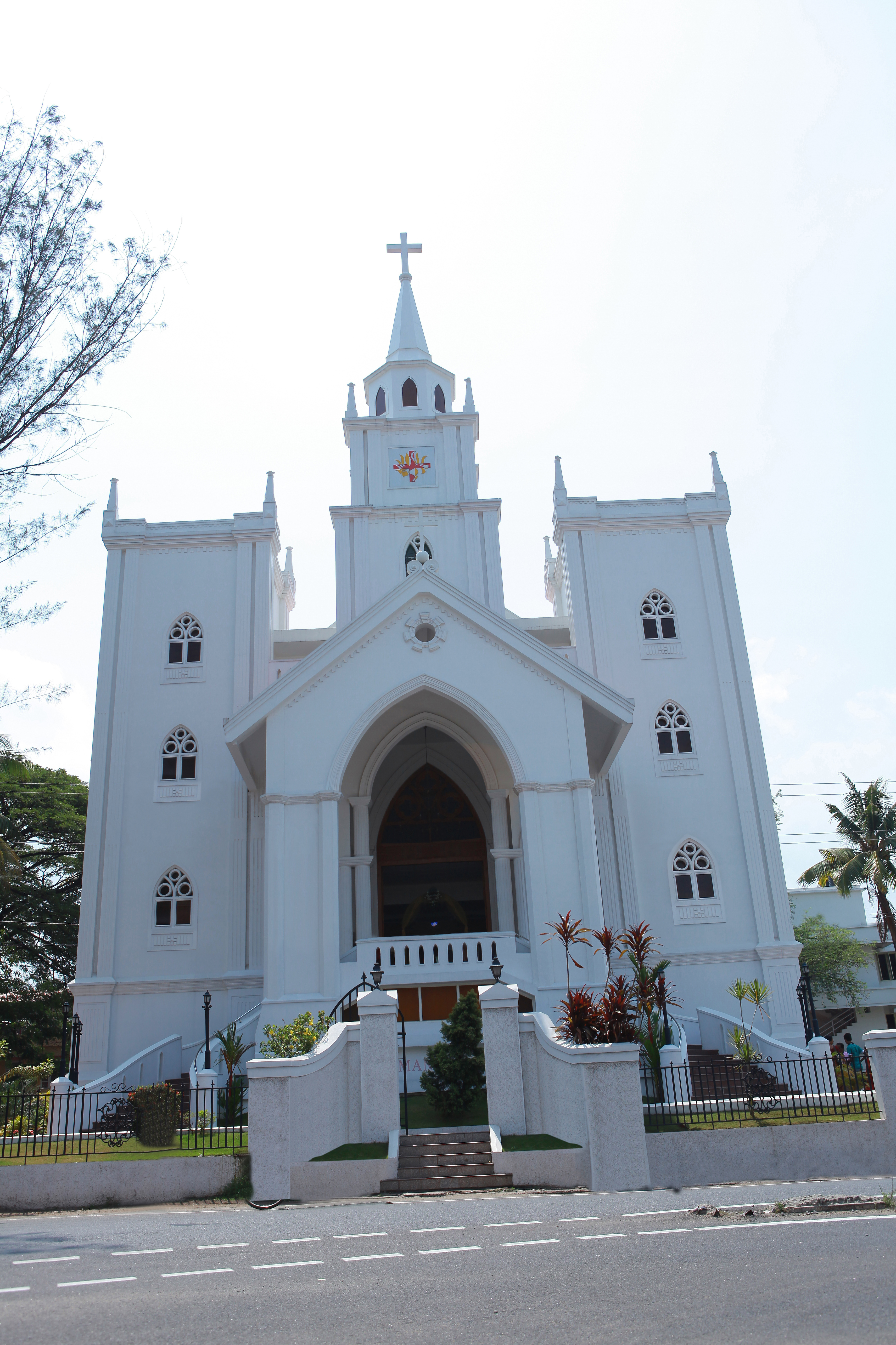 church